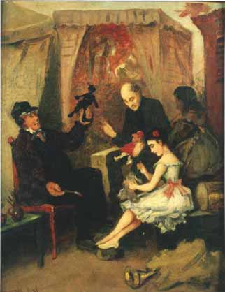 Puppenspieler auf der Kirmes; Düsseldorf um 1870; Öl auf Leinwand; 33,5 x 29 cm; signiert u.l.: Simmonds Düdf.; Theaterwissenschaftliche Sammlung der Universität zu Köln (Schloss Wahn), Inv.-Nr. 41600 (Sammlung Niessen)